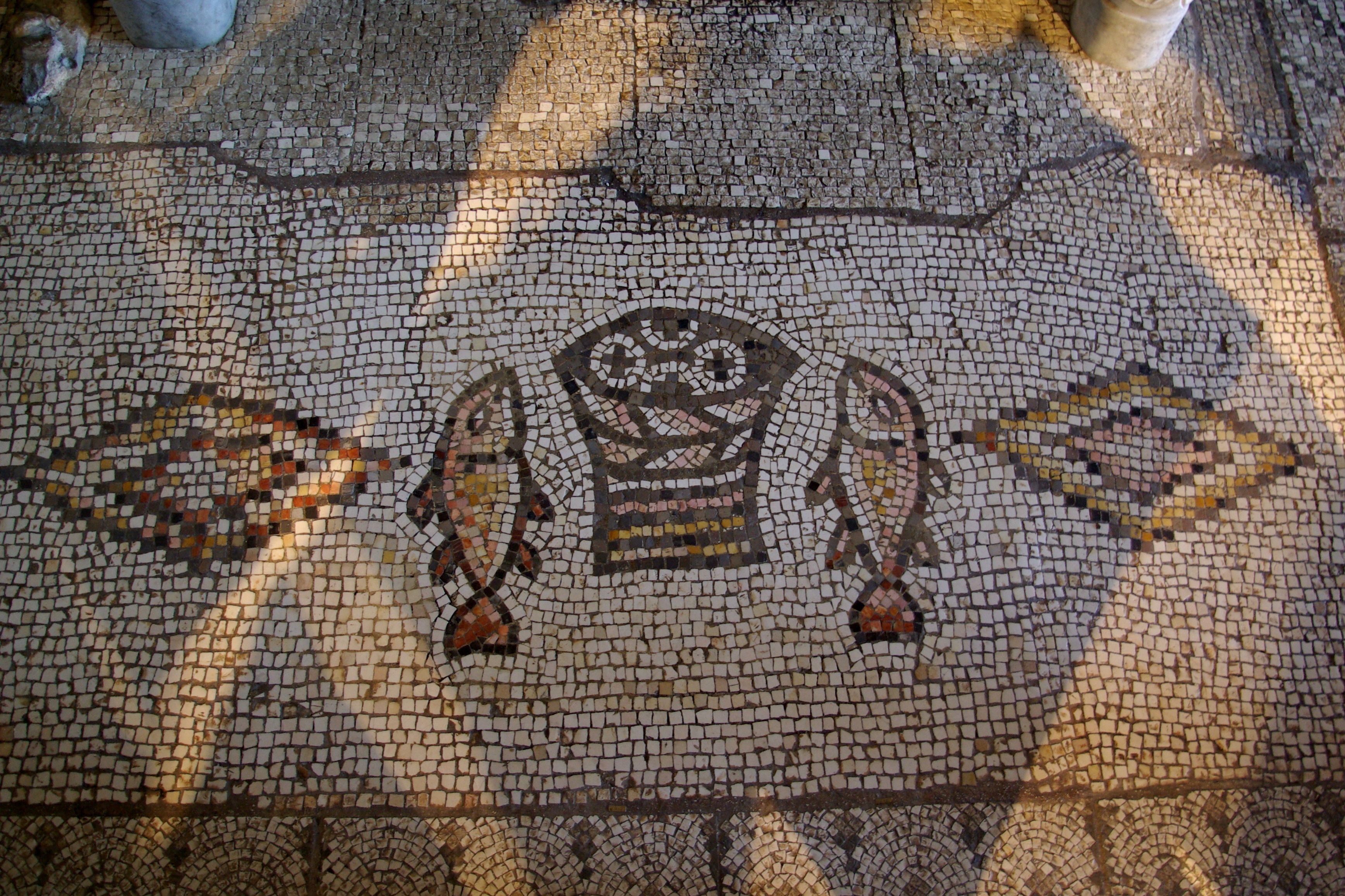 Brotvermehrungskirche in Tabgha, Mosaik: vier Brote und zwei Fische